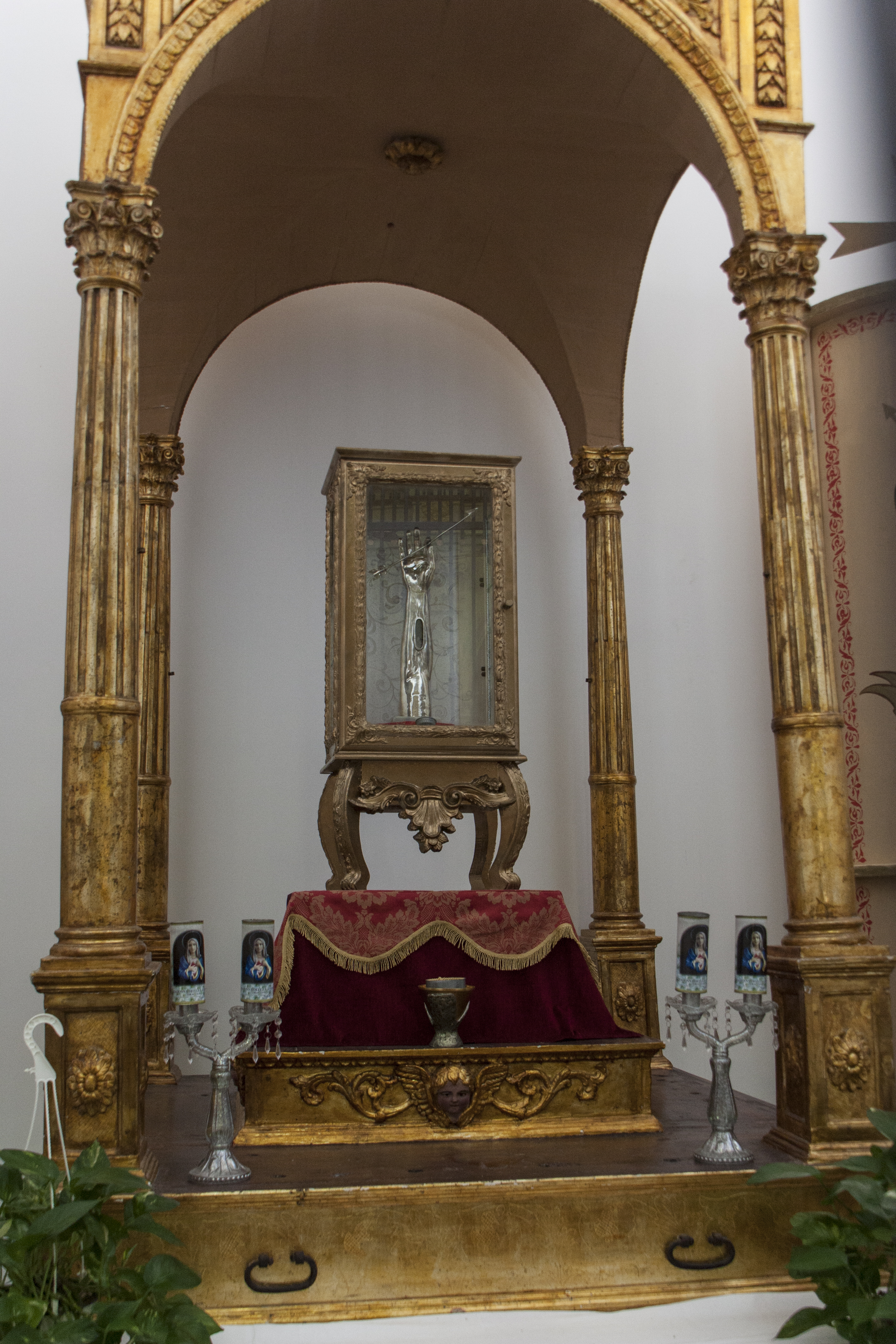 reliquia